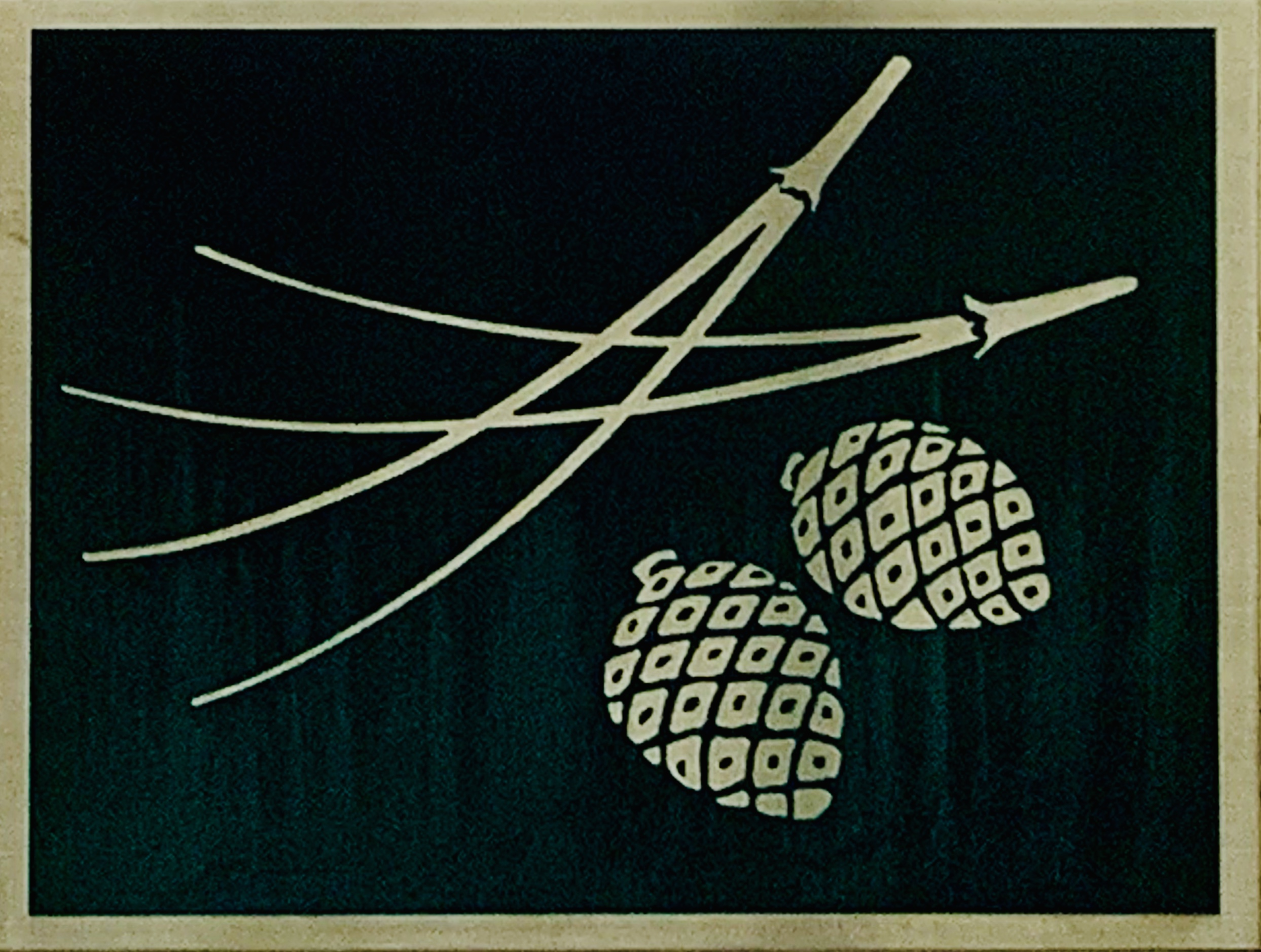 都営新宿線本八幡駅のホームで撮影された本八幡駅のシンボル